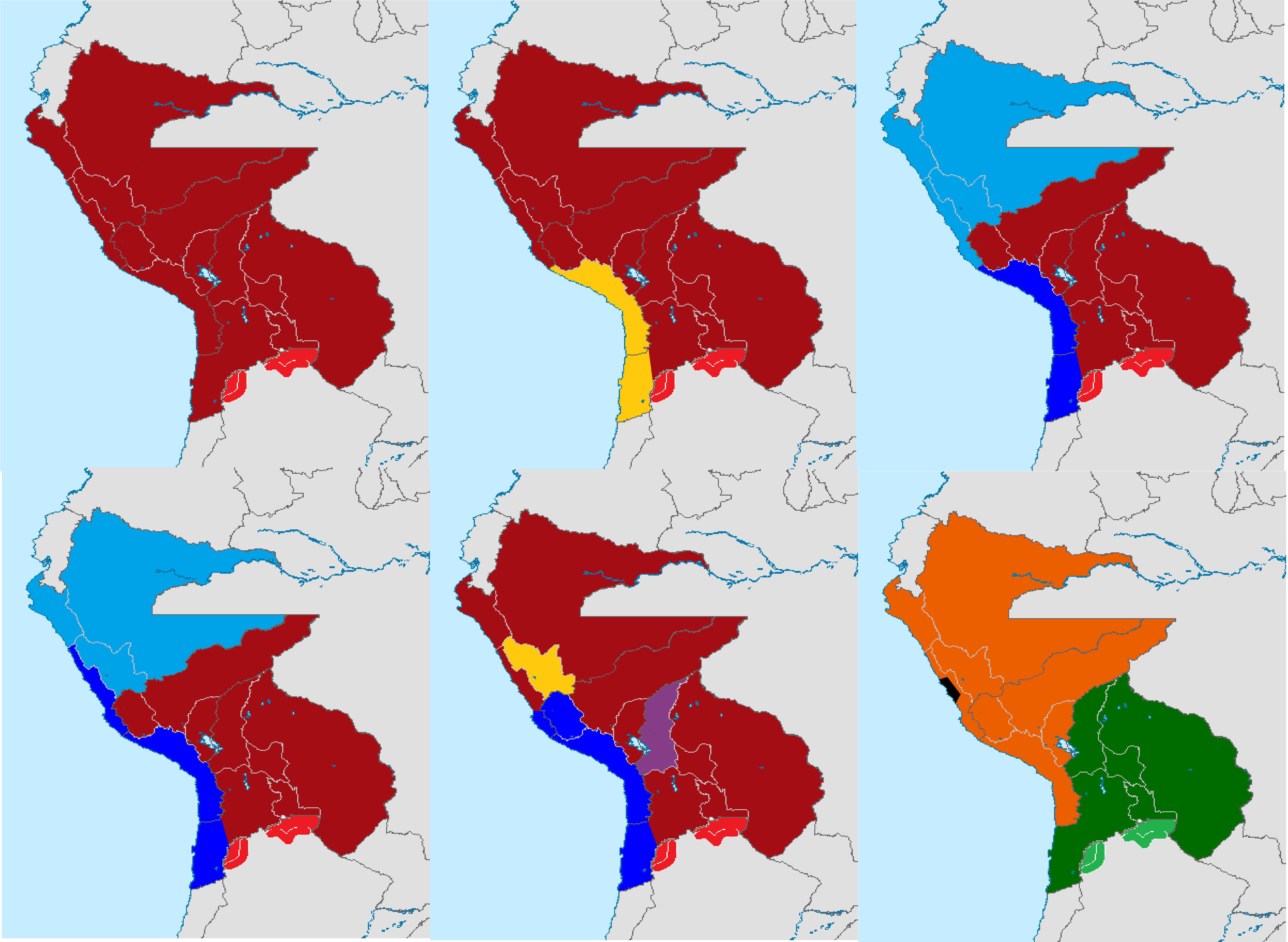 Cronología de la confederación Perú-Boliviana desde su concretada existencia hasta su disolución.